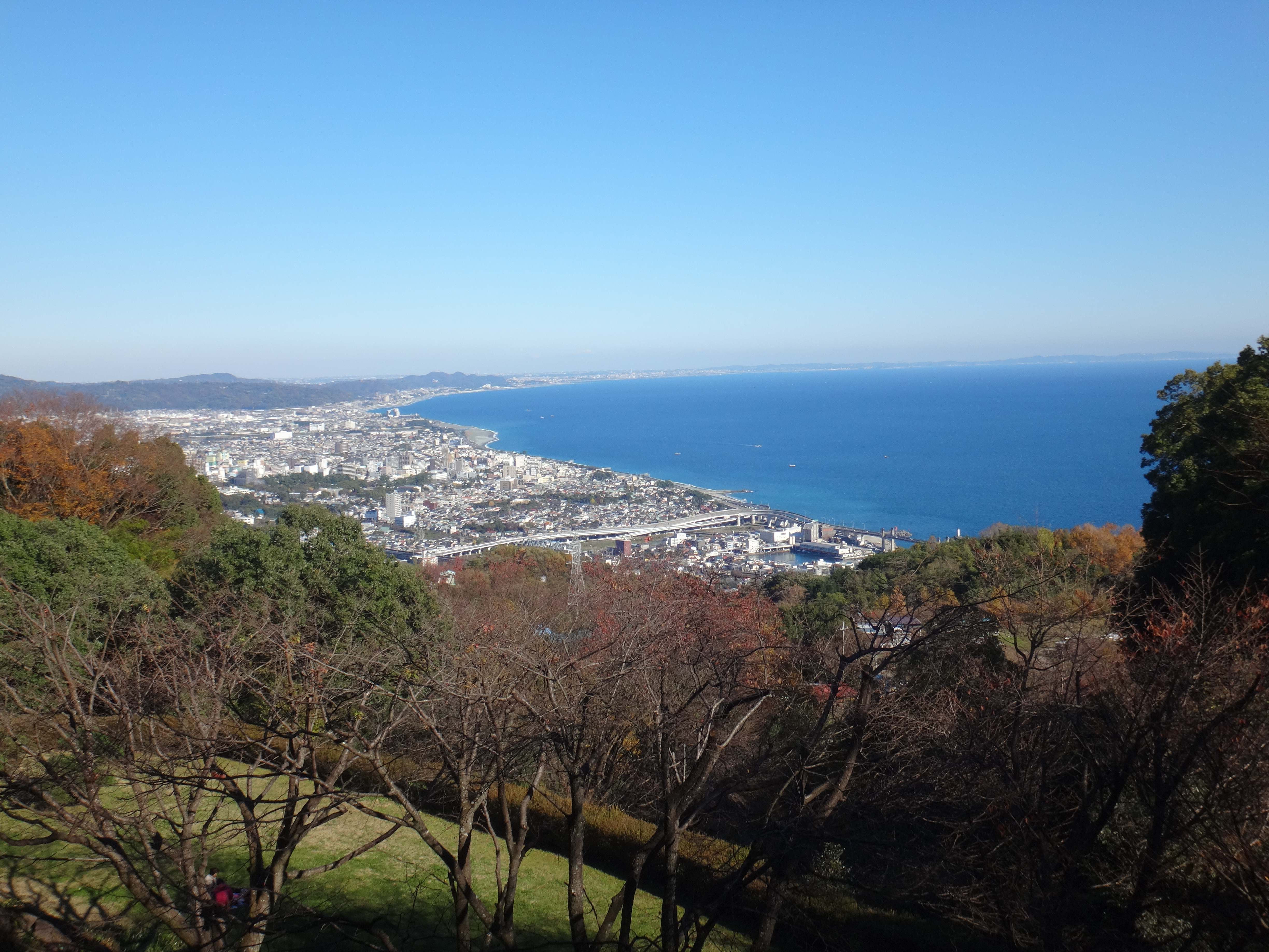 石垣山から小田原市と相模湾を望む